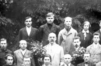 Беларуская (тарашкевіца): Удзельнiкi акруговага зьезду Таварыства беларускай школы ў Гораднi. Другi зьлева ў першым радзе паэт Мiхась Васiлёк, у цэнтры другога раду Аляксандар Уласаў, справа ад яго Рыгор Шырма.